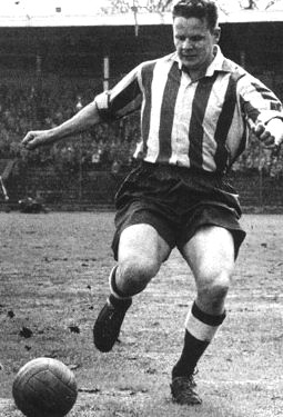 Gösta "Knivsta" Sandberg, Djurgårdens IF på Stockholms Stadion.